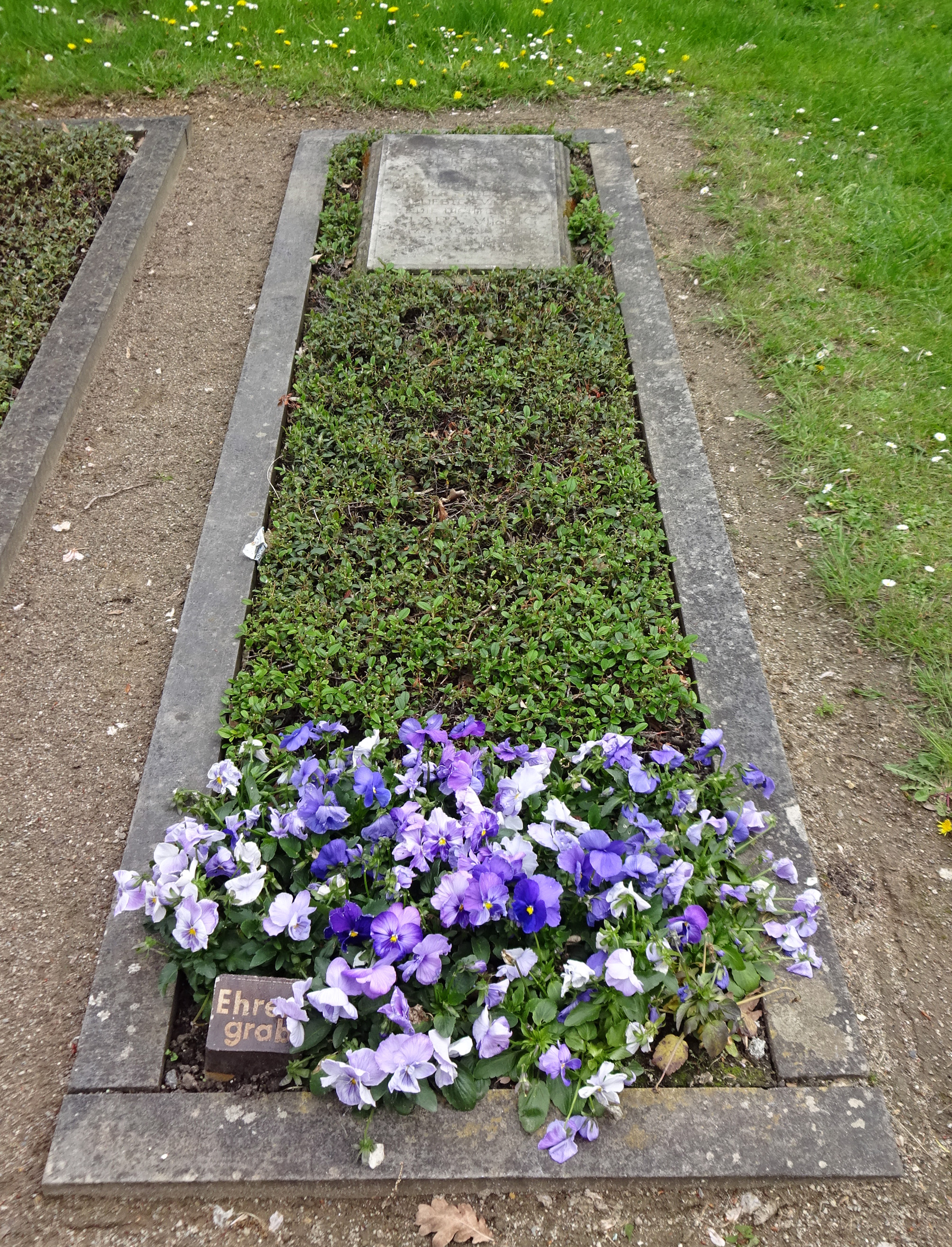 Ehrengrab Ernst Viebig (1810–1881) und Tochter Clara Viebig (1860–1952), Nordfriedhof Düsseldorf